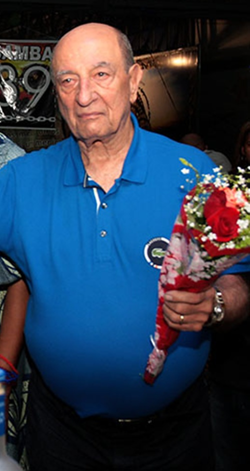 bf25